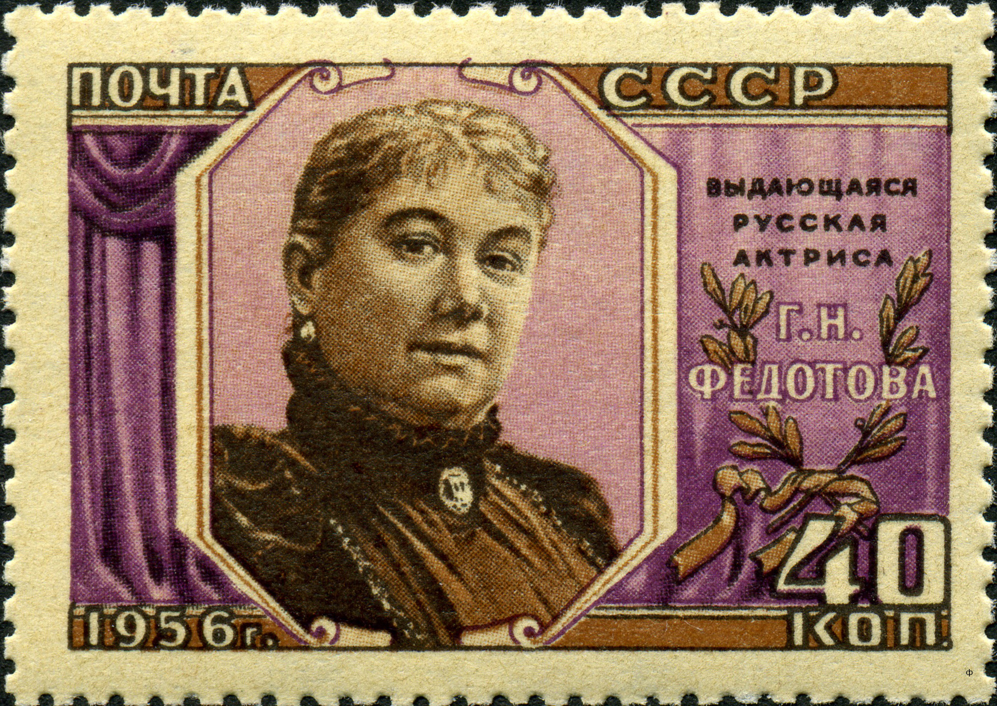 Марка СССР